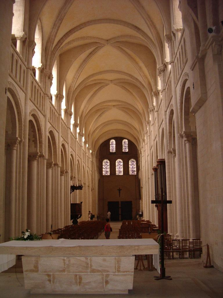 Eglise abbatiale de la Sainte Trinité Abbaye aux Dames Caen